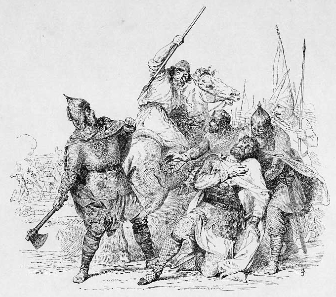 Великий Князь Изяслав I Ярославич. 1054-1078 г. Изяслав I, дважды занимавший престол Киевский, погиб в междоусобной битве, сраженный копьём неизвестного всадника. Первый из русских правителей уничтожил смертную казнь, заменив ее денежною пенею.